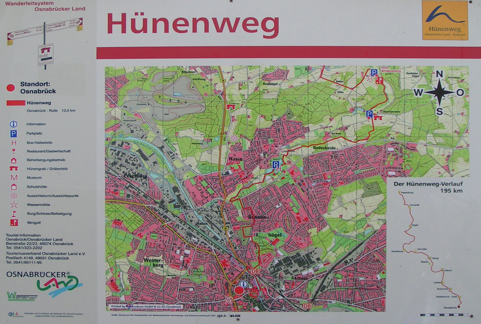 Beginn bzw. Ende des Hünenwegs in der Nähe des Rathauses Osnabrück